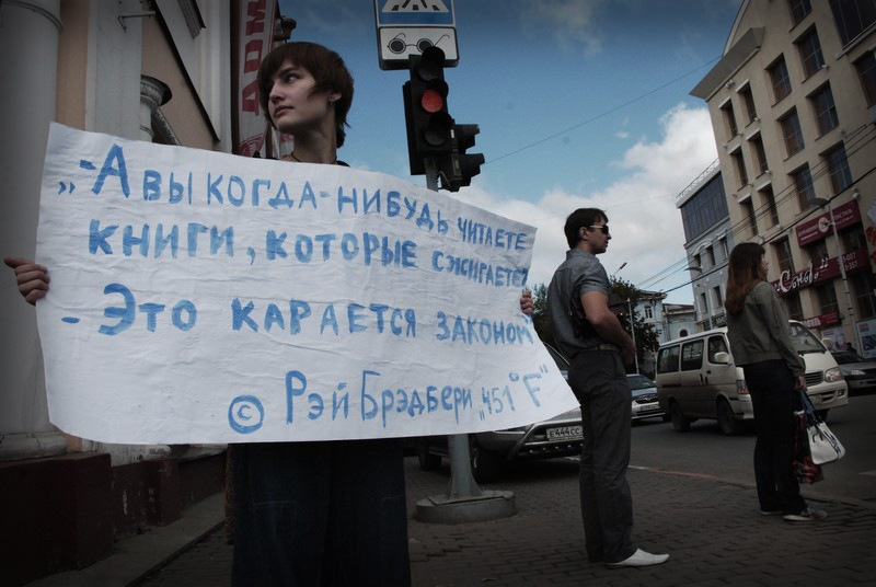 Одиночный пикет у здания Ленинского районного суда города Томска в день второго судебного заседания по делу о признании книги "Бхагавад-гита как она есть" экстремистским материалом.